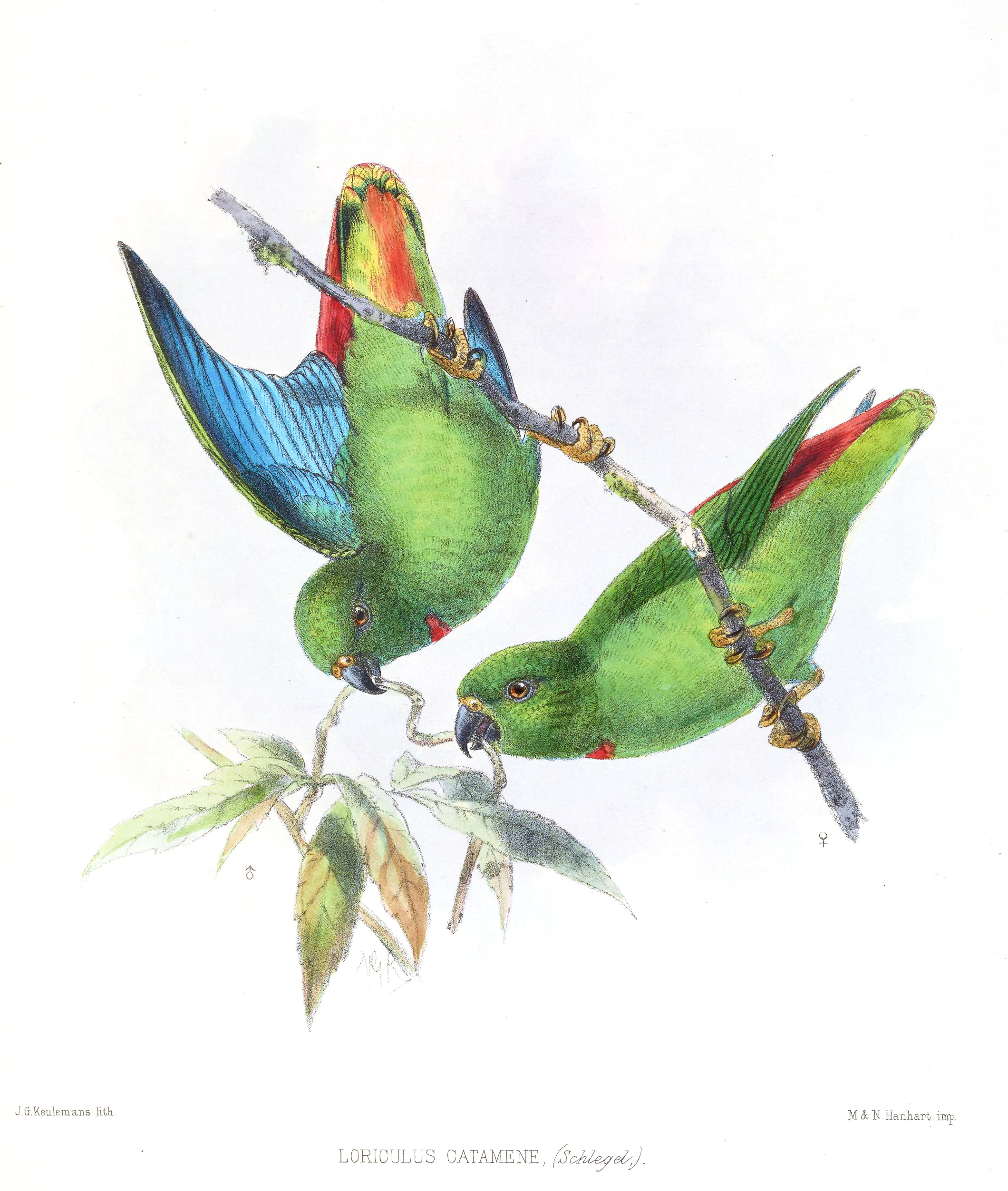 Loriculus catamene